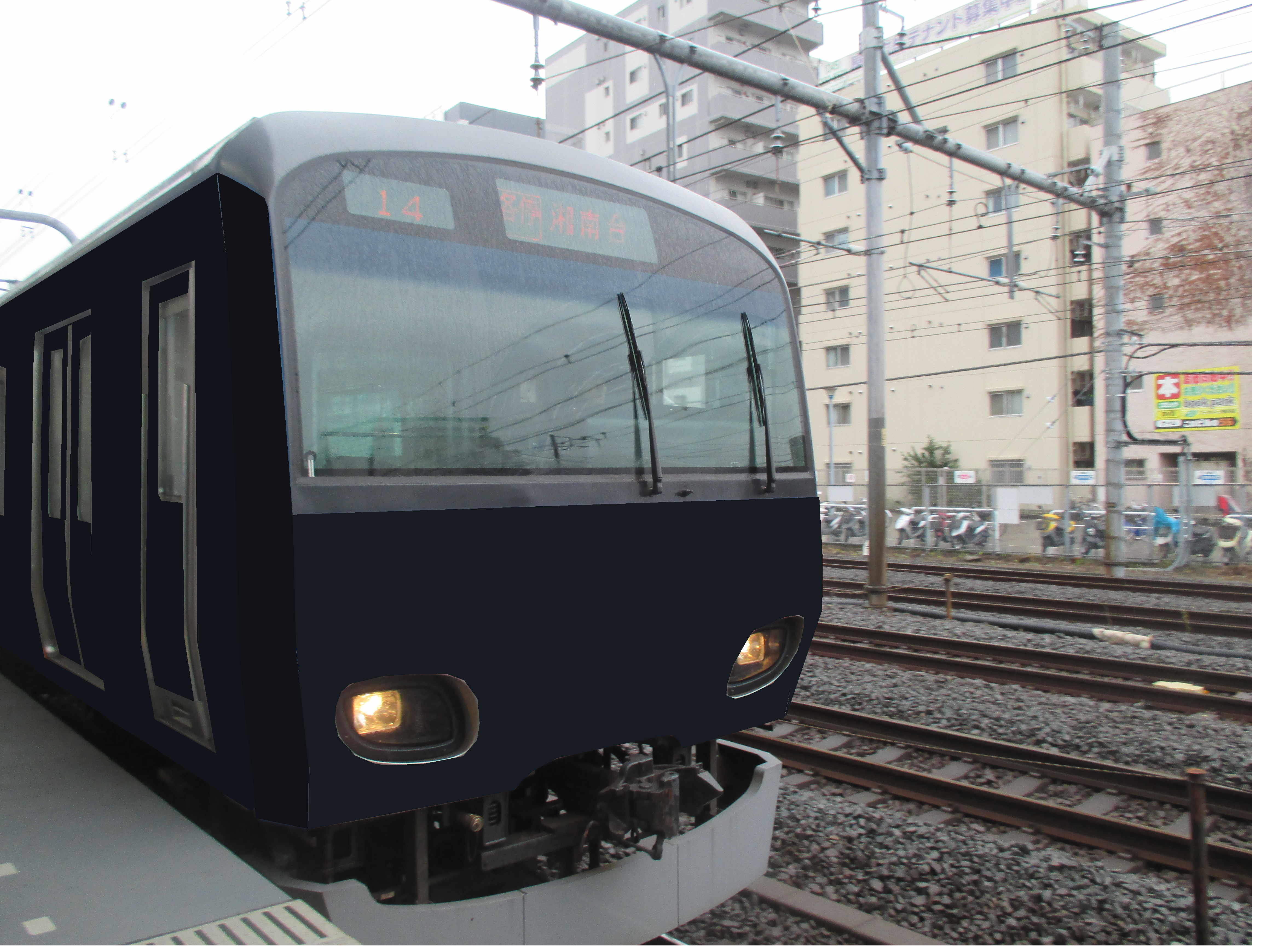 相模鉄道が現在進行している車両の塗装の変更で犠牲となった相模鉄道10000系です｡(作者⇒@_Tokyo113)